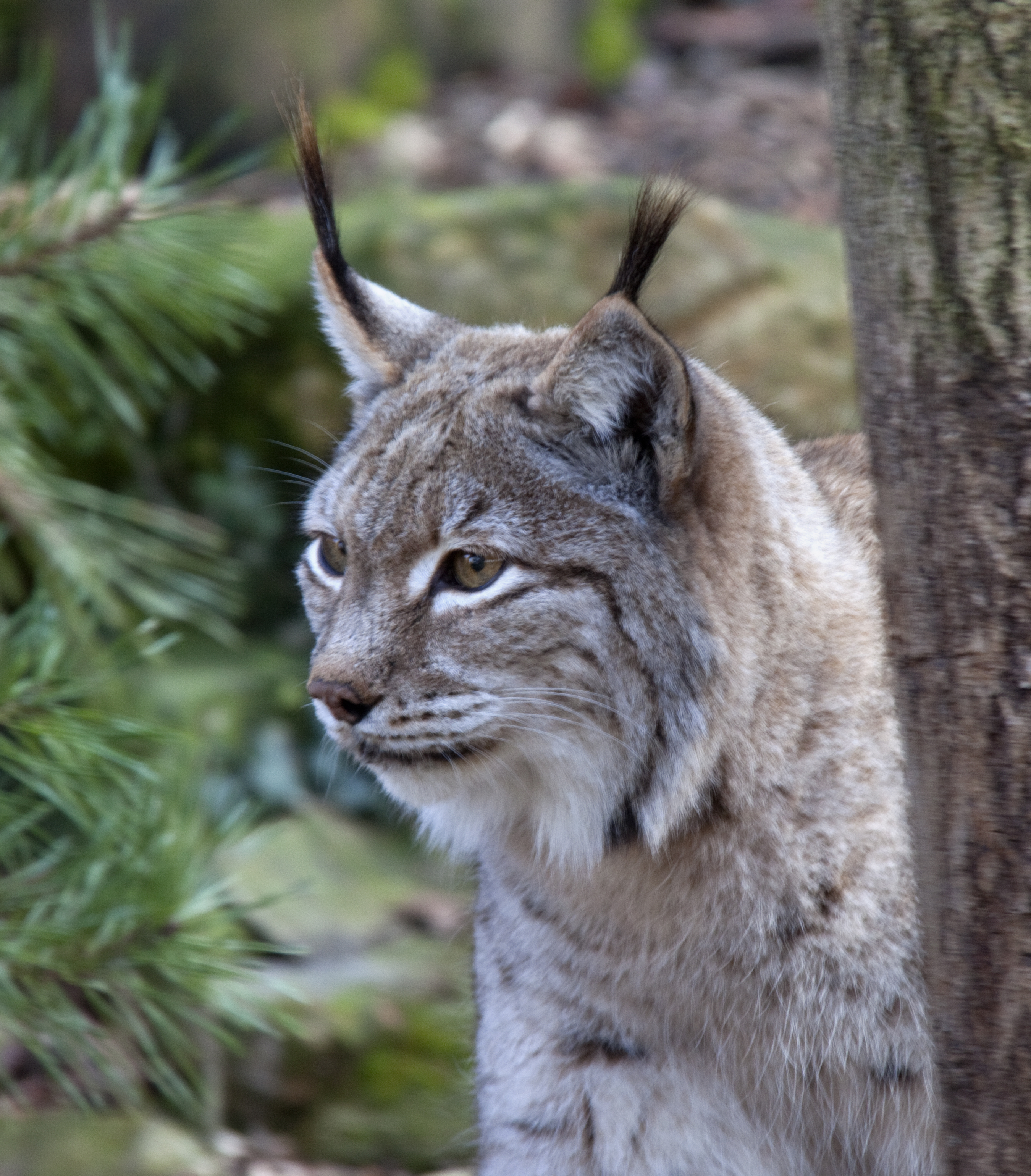 Lynx 1d